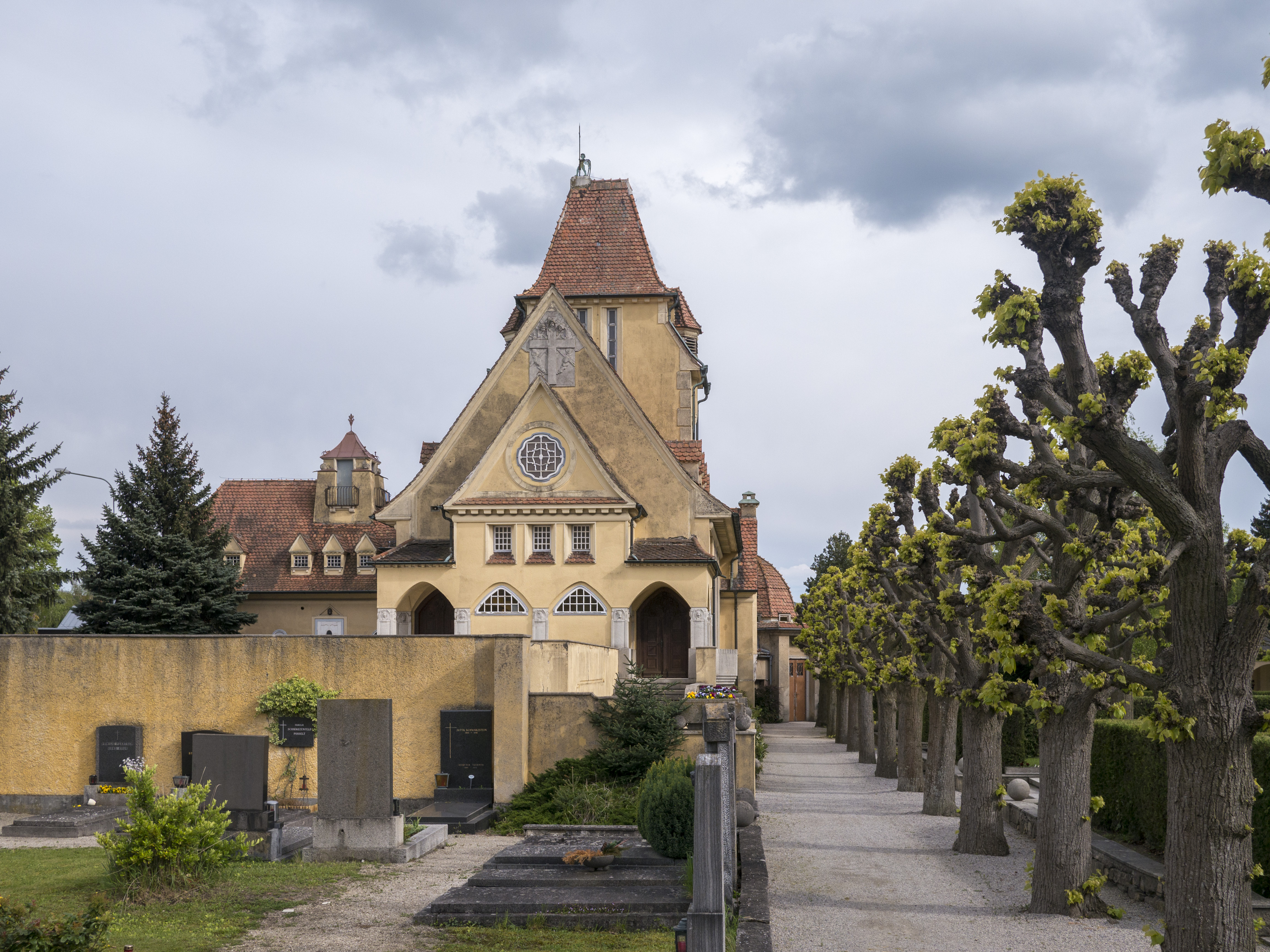 Friedhof christlich; Heldenfriedhof angelegt 1915-1917 (Karl Lehrmann); In der Kapelle befindet sich u. a. ein Mosaikbild des letzten österreichischen Kaisers, Karl I. (von Leopold Forstner)